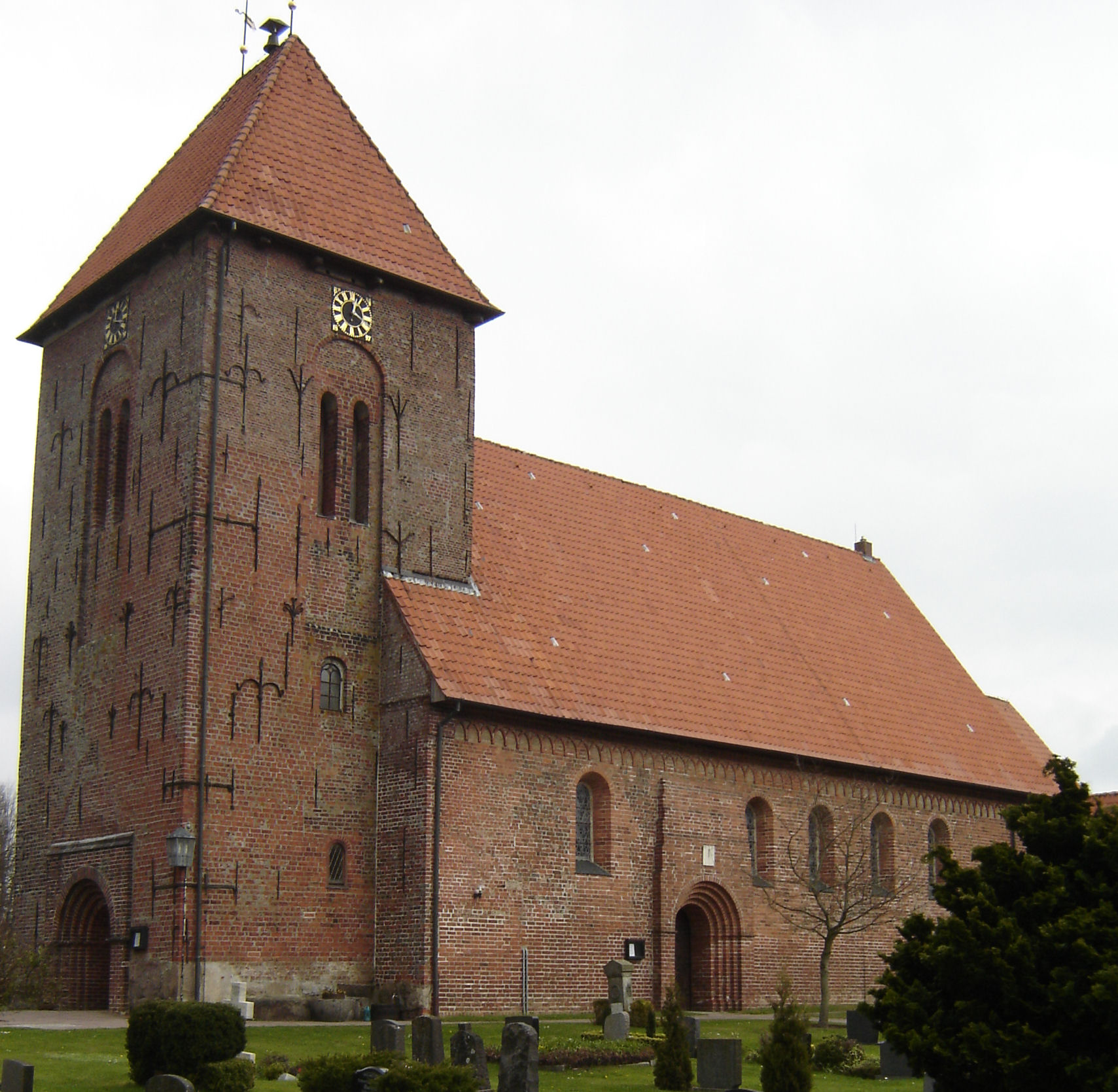 St. Lambertikirche in Mildstedt (Nordfriesland), Schleswig-Holstein, Deutschland.